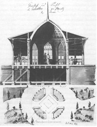 Entwurfsskizze für einen Eiskeller